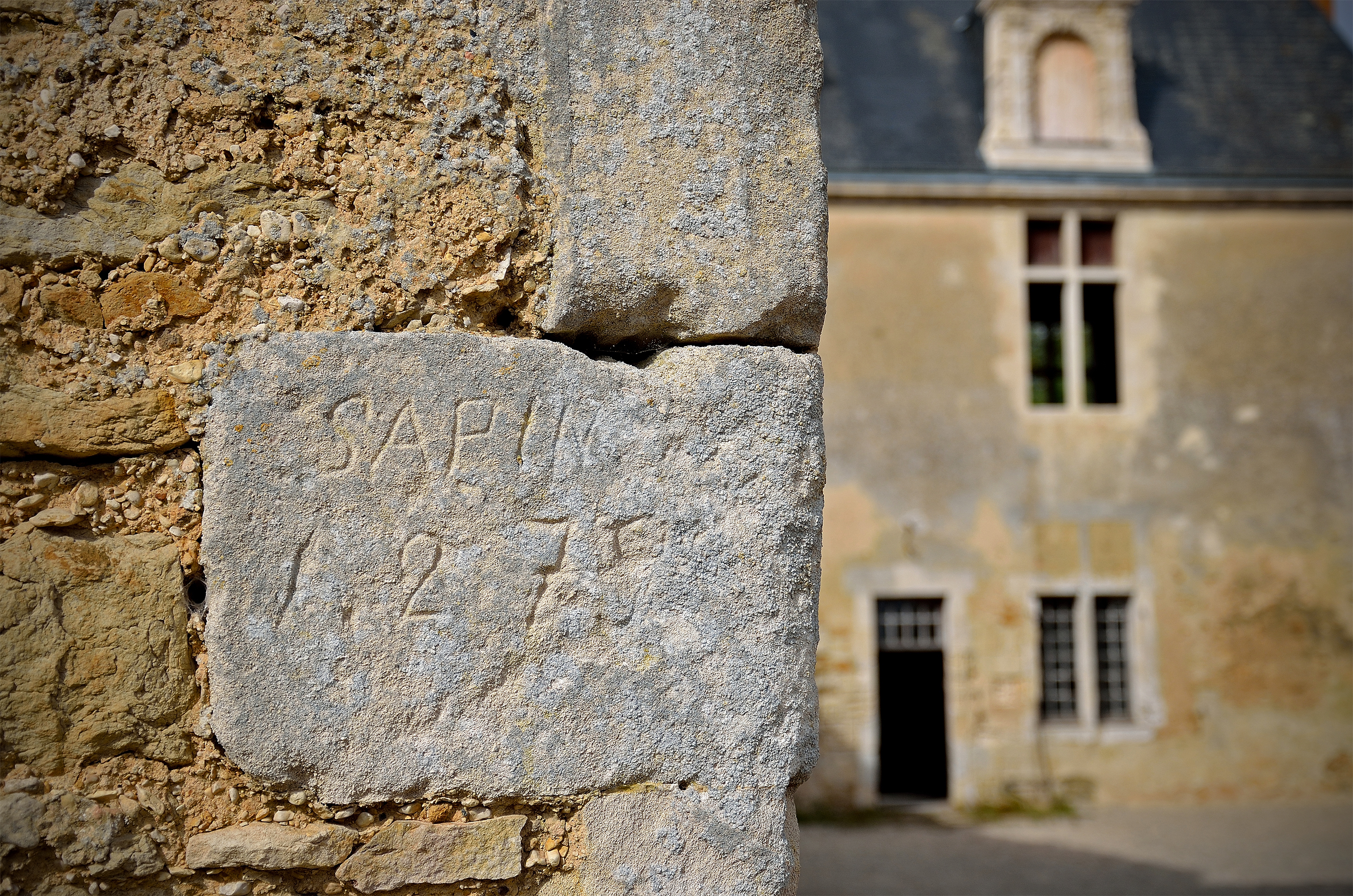 Avesnes-en-Saosnois _ Sarthe _ Pays De La Loire .